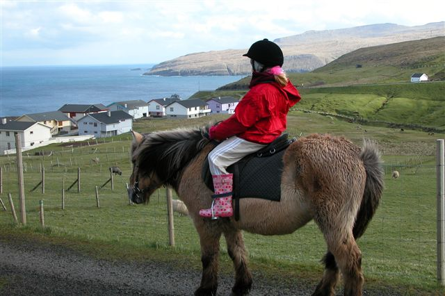 Hest(blanding af færøsk hest og fjordhest) i Porkeri